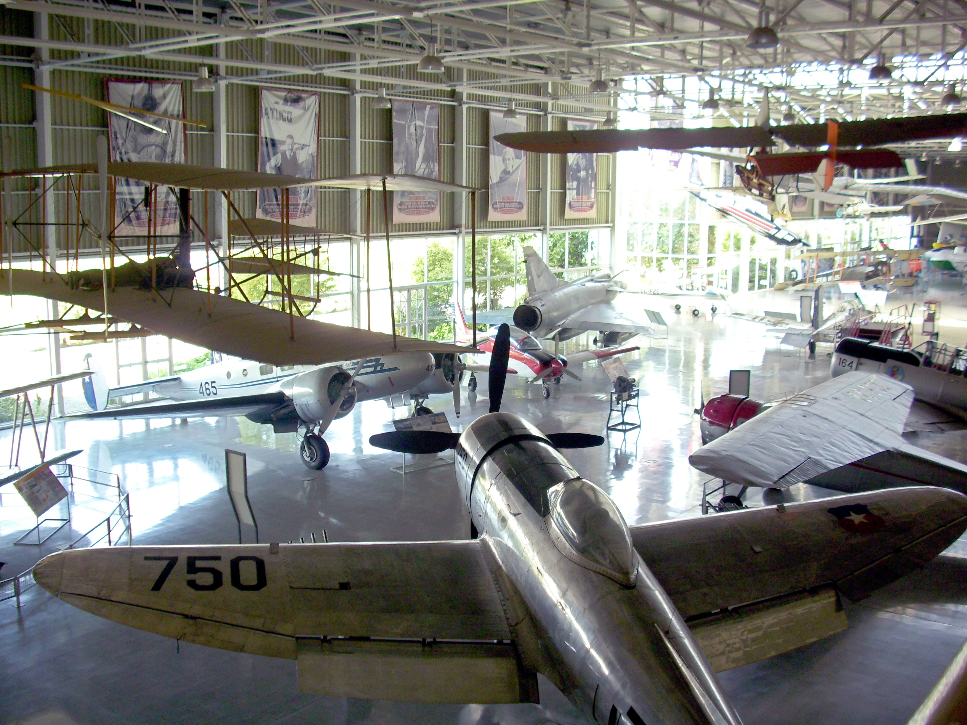 El hangar del Museo Nacional Aeronáutico y del Espacio, utilizado como salón de exhibición de aeronaves. Cerrillos, Santiago de Chile.